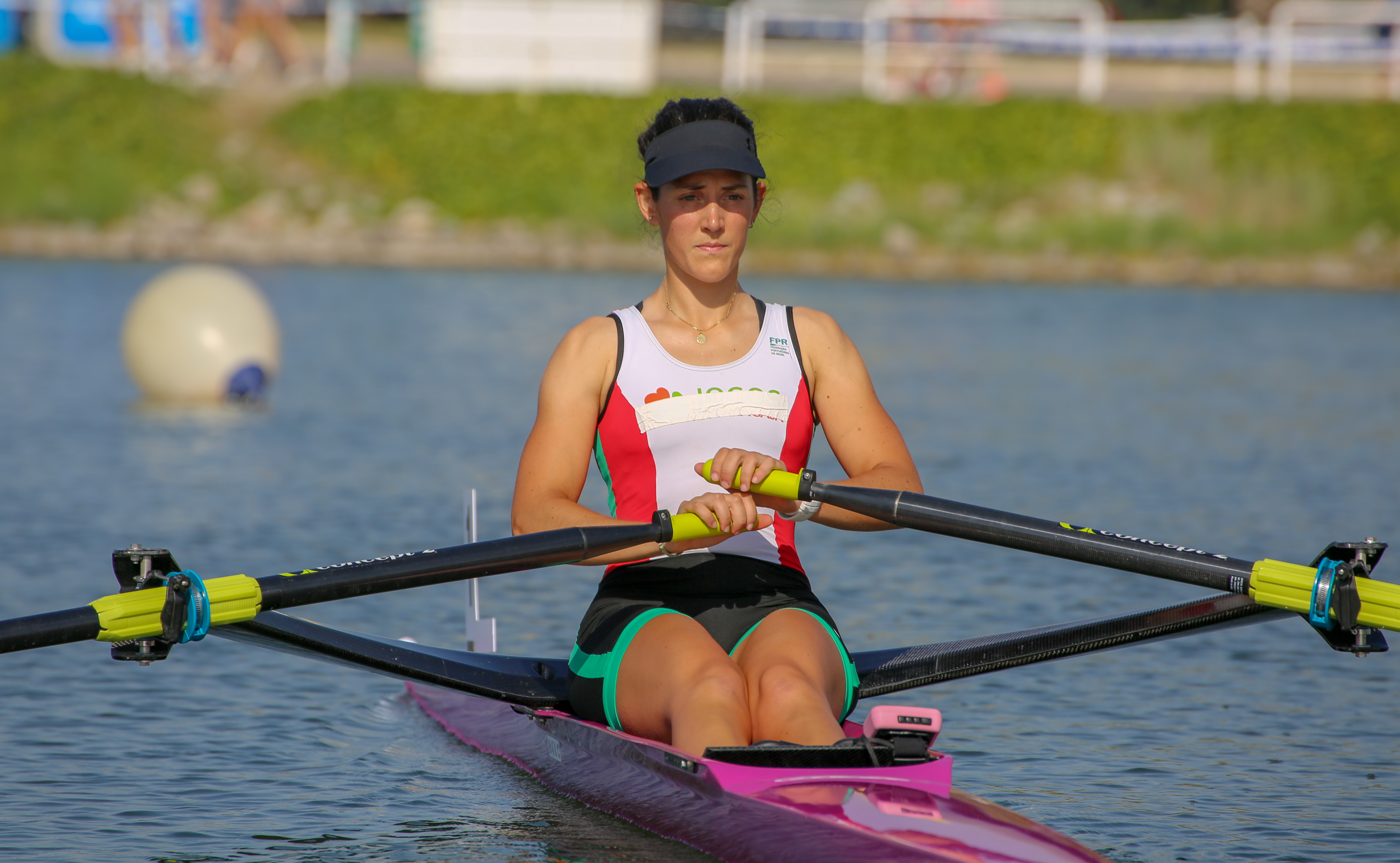 Joana Branco, quinta en los Juegos del Mediterráneo 2018